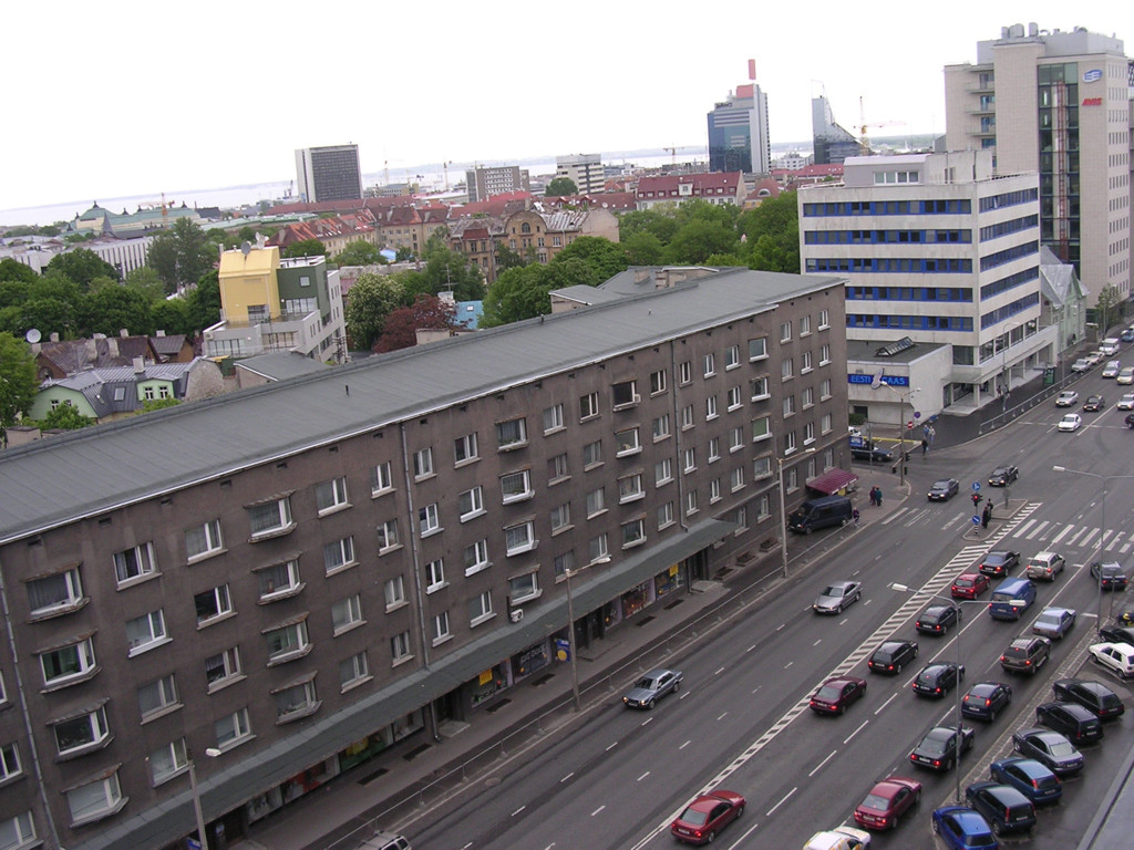 Liivalaia, view from Hansapank